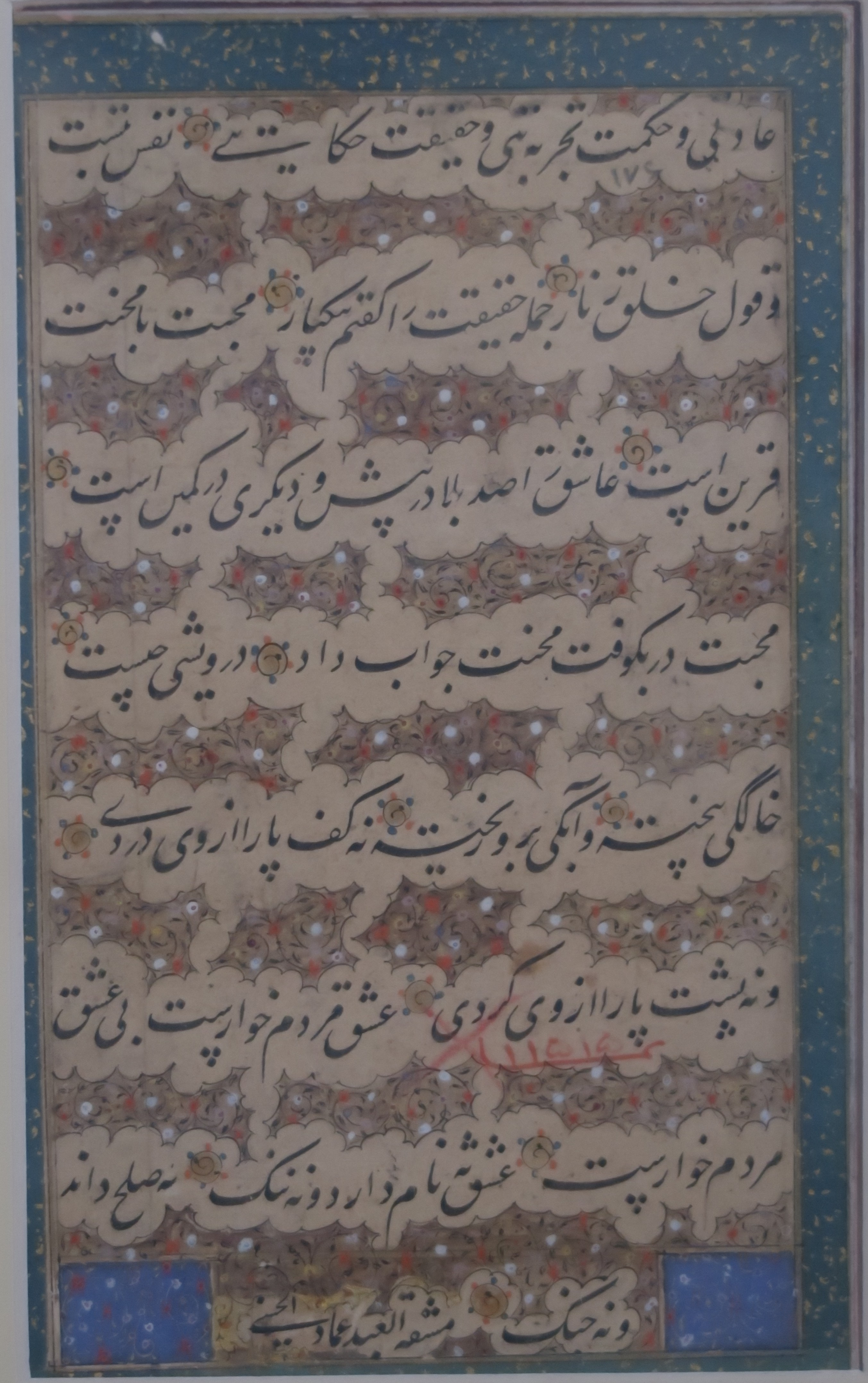 خط نستعلیق میر عماد - موزه ایران باستان